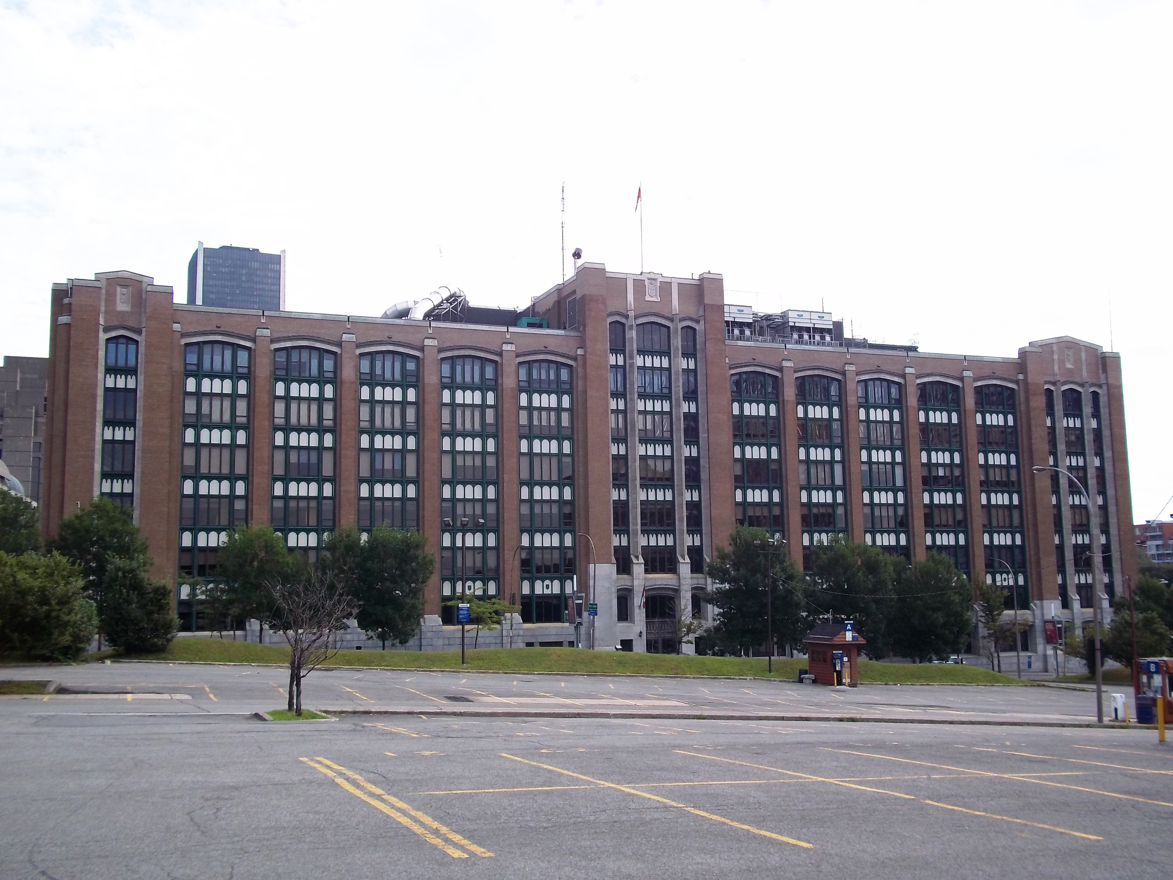 Bureau de poste central de Montréal, 715, rue Peel (info image)